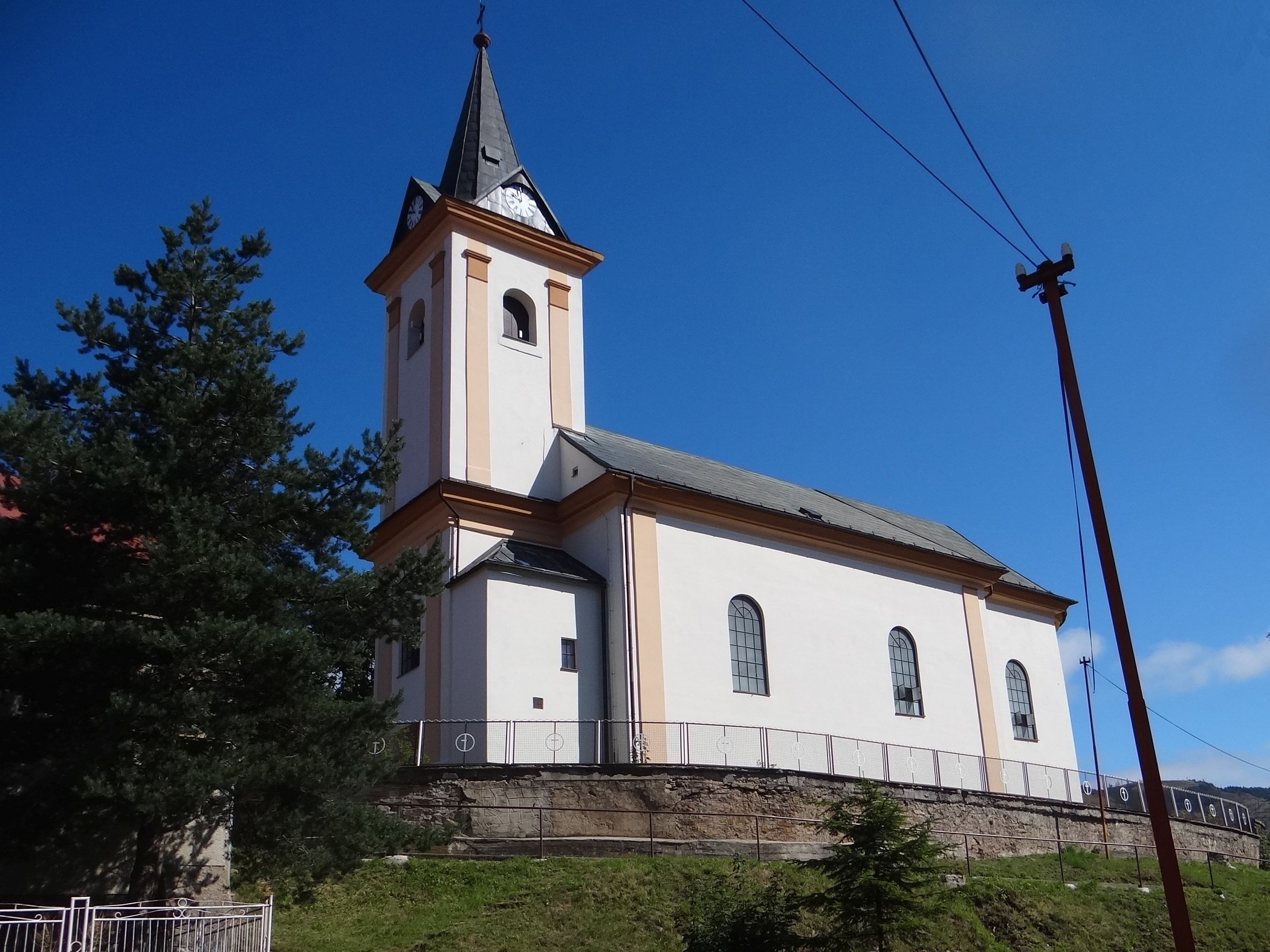 Vikartovce